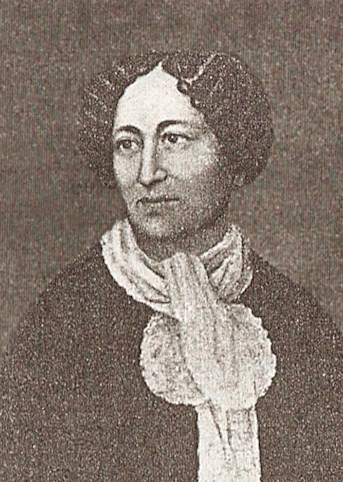 Gertrude Gräfin von Schaumburg, Fürstin von Hanau und Horowitz (1805-1882)